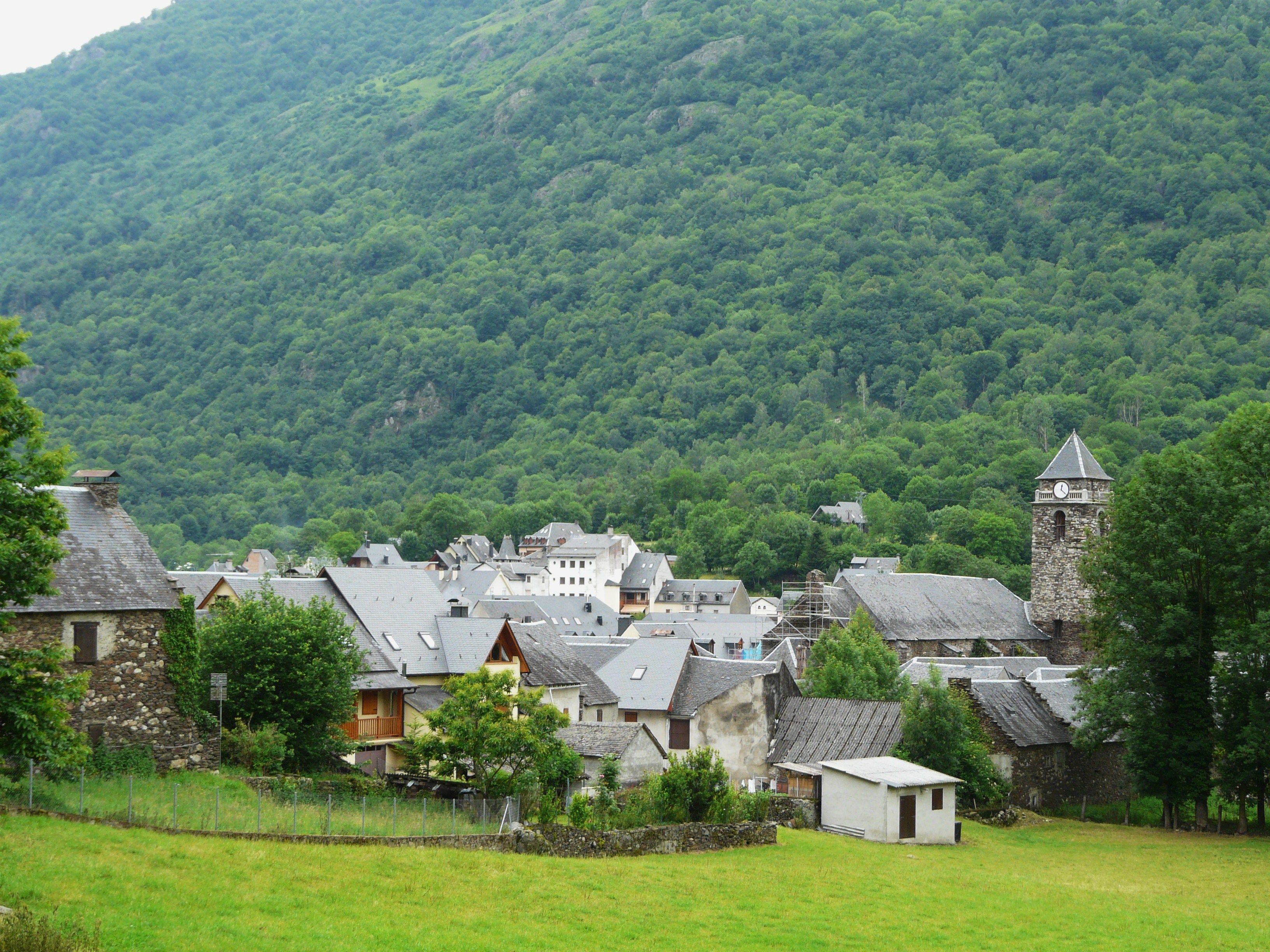 Le village de Les, Val d'Aran, Catalogne, Espagne.